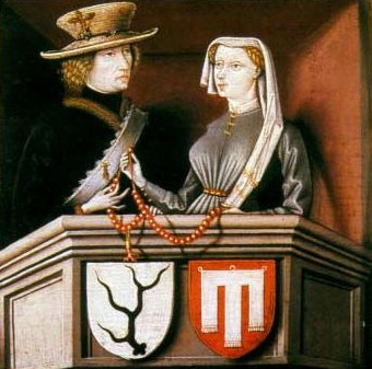 Gräfin Agnes von Werdenberg und Wilhelm Schenk von Schenkenstein, Schwäbisch Hall, Sammlung Würth, Inv. 6468, zuvor Donaueschingen, Fürstliche Sammlungen, zuvor Schloss Heiligenberg